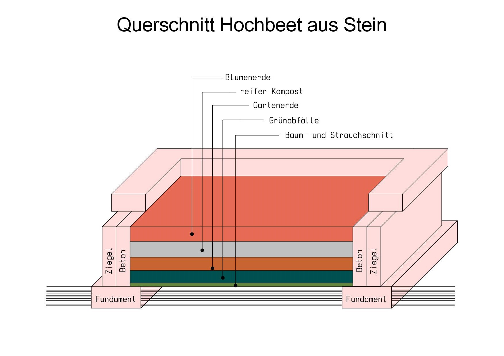 Skizze eines gemauerten und betonierten Hochbeets im Querschnitt. Aufbau der Füllschichten.